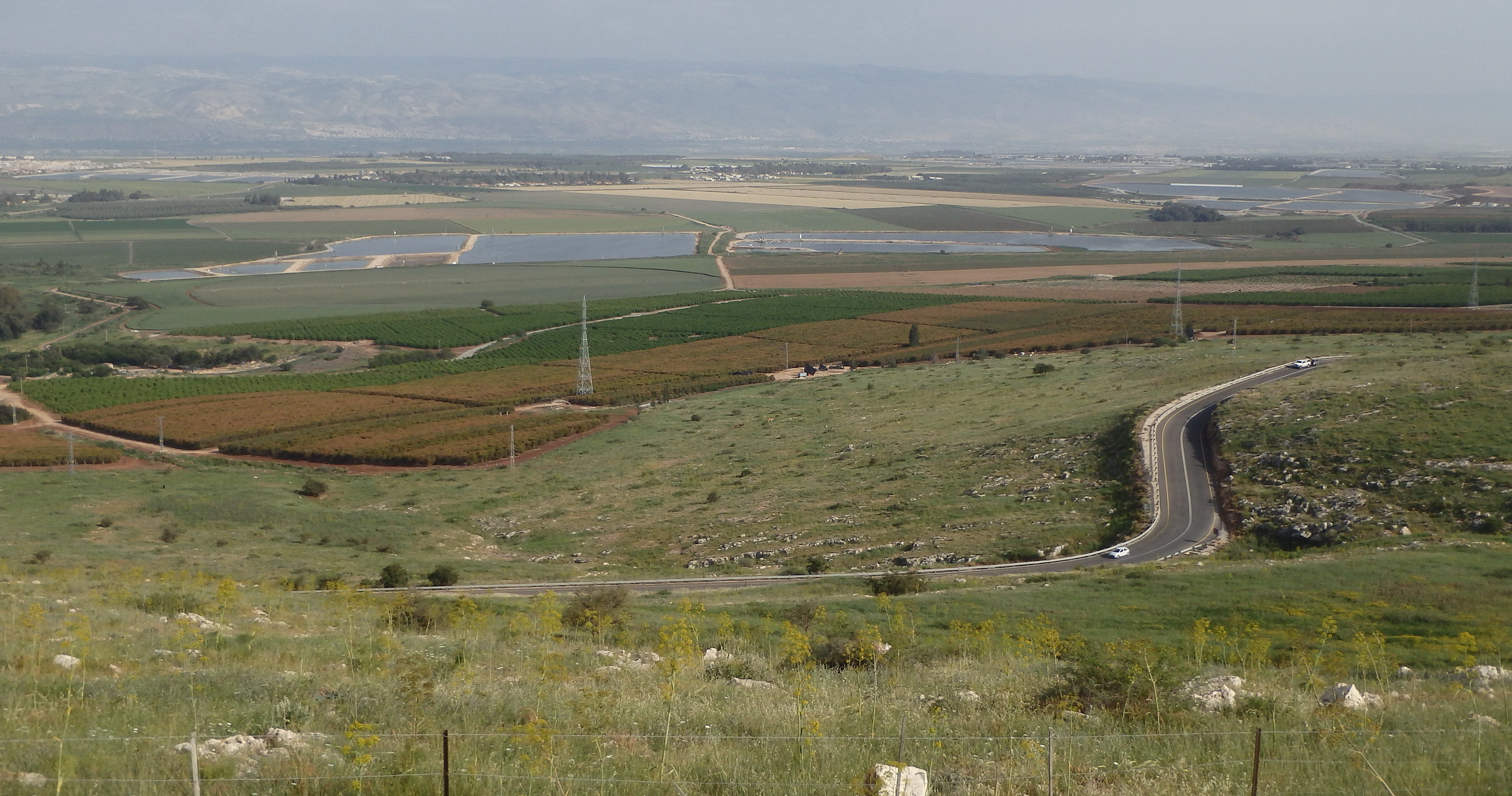 Вид на Изреельскую долину с хребта Гильбоа